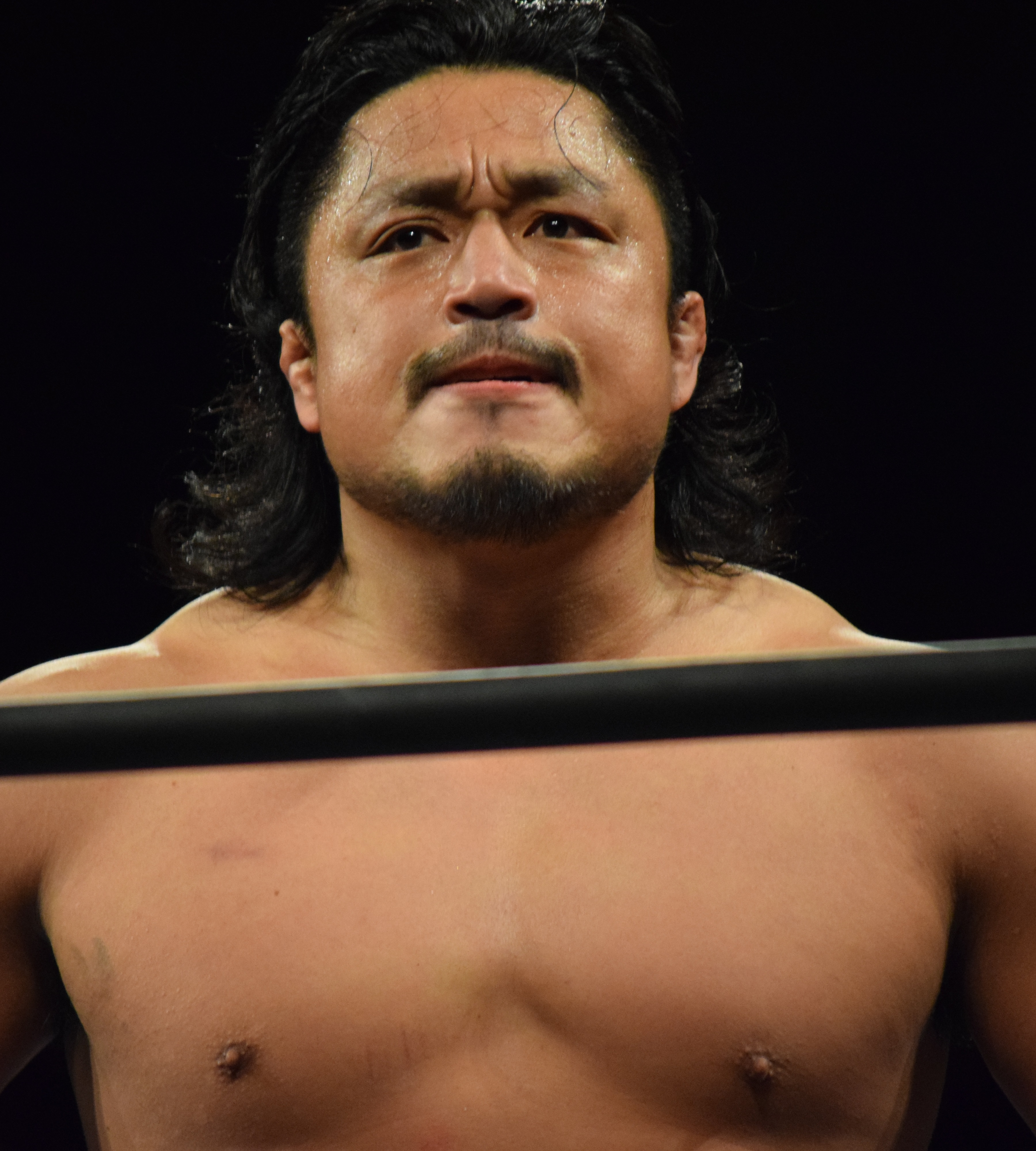 2016年3月20日 ベイコム総合体育館「Road to INVASION ATTACK 2016」 後藤洋央紀